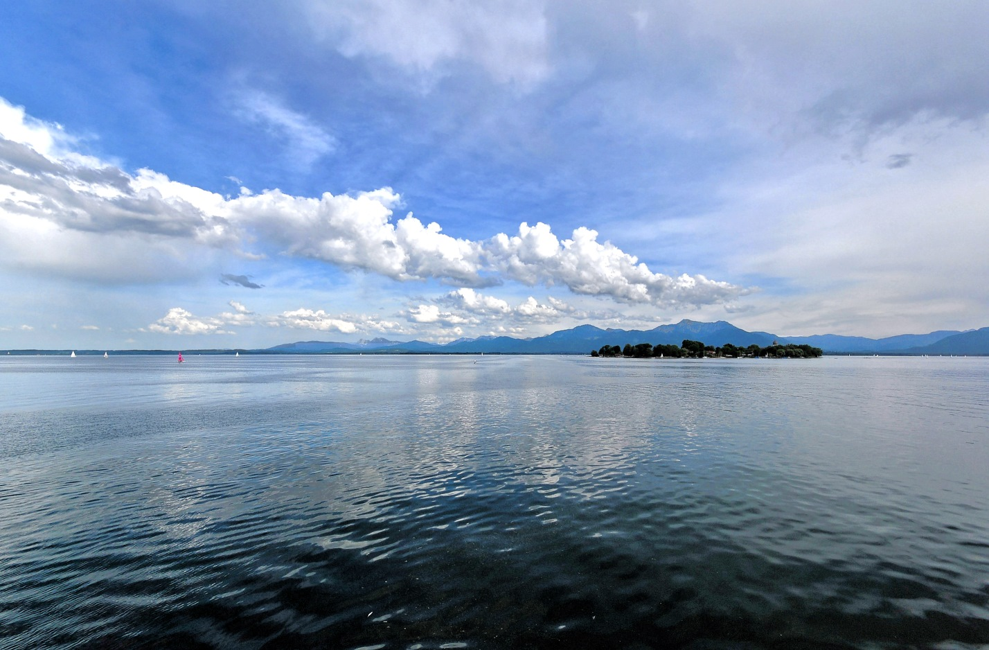 Frauenchiemsee, island